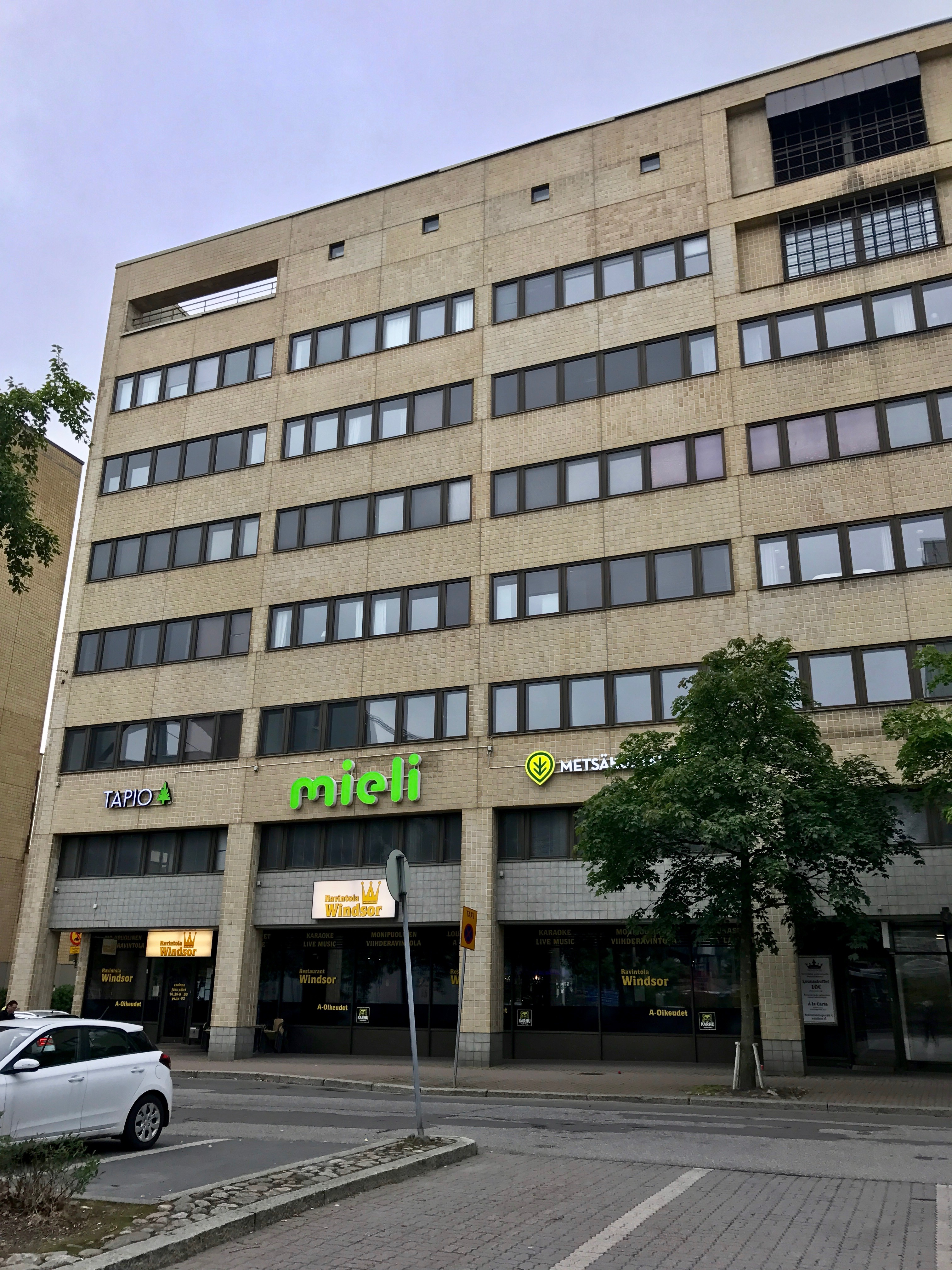 Toimistorakennus osoitteessa Maistraatinportti 4, Helsinki.